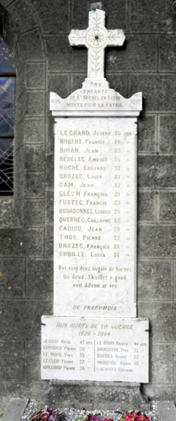 Lokmikael. Delwenn ar Rev Varv